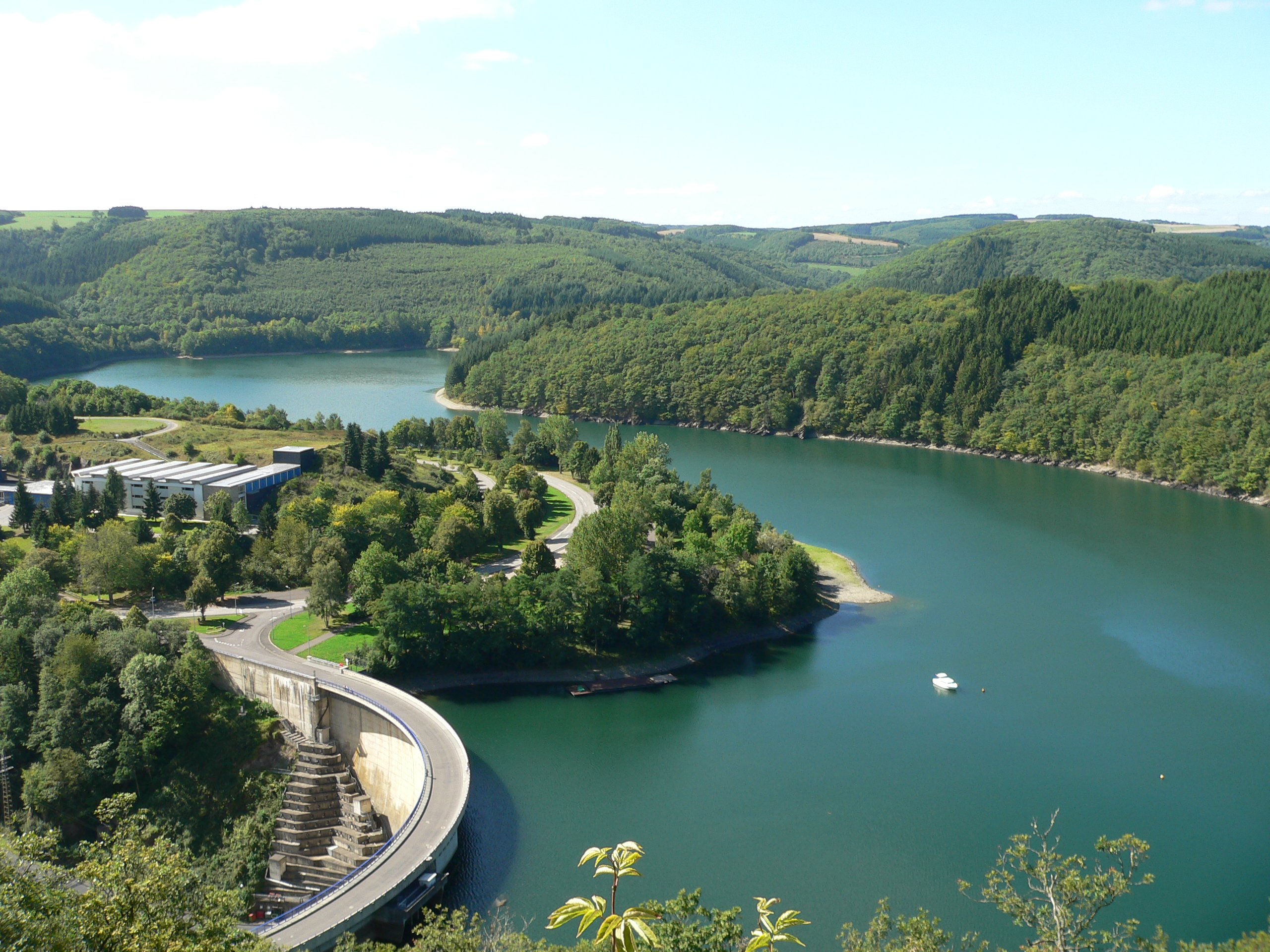 Staumauer Esch / Sauer